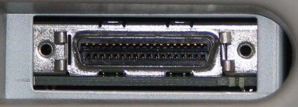 Centronics 0.05" female.